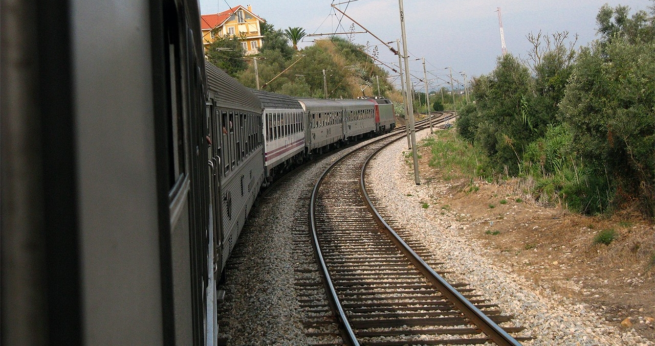 Sud pelo Ribatejo.